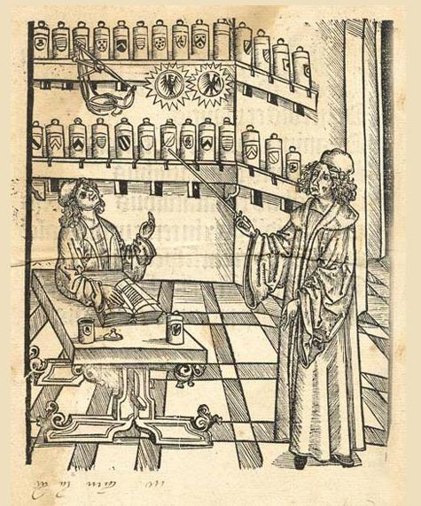 Frontispice de l'Ortus sanitatis, impr. à Strasbourg, par Johann Pruss, 1497-1499.